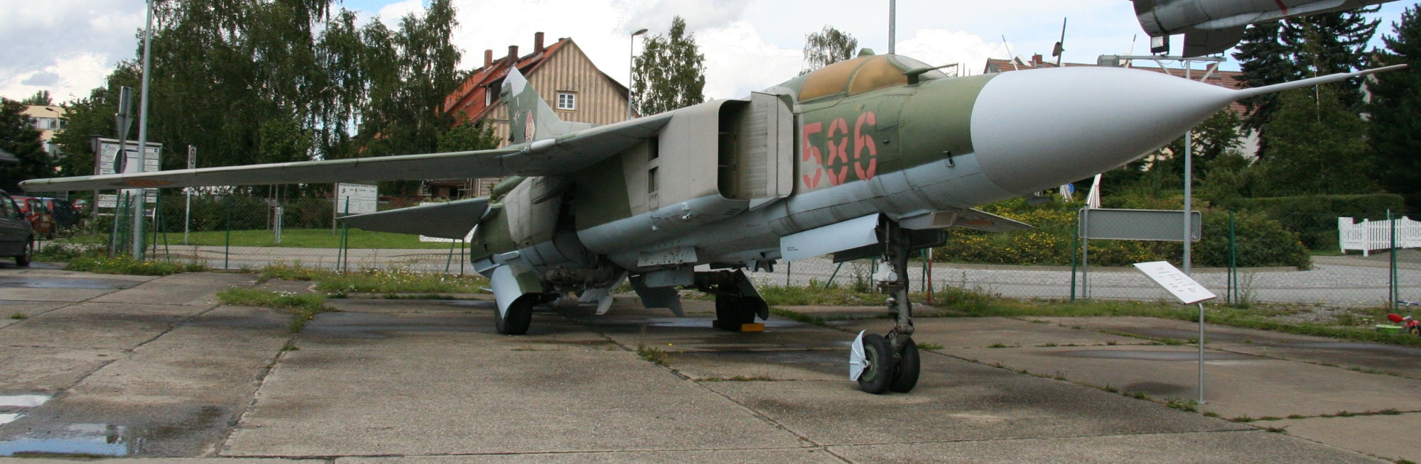 MIG-23MF im Museum für Luftfahrt und Technik in Wernigerode